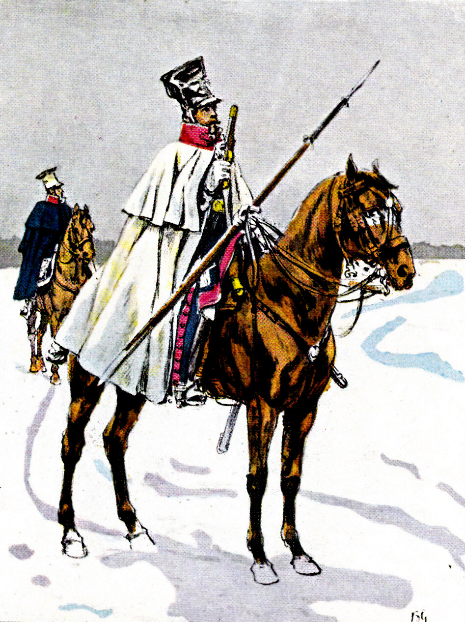 Chevau-léger lancier (au premier plan) et officier (au second plan) du régiment polonais de la Garde impériale en Russie.